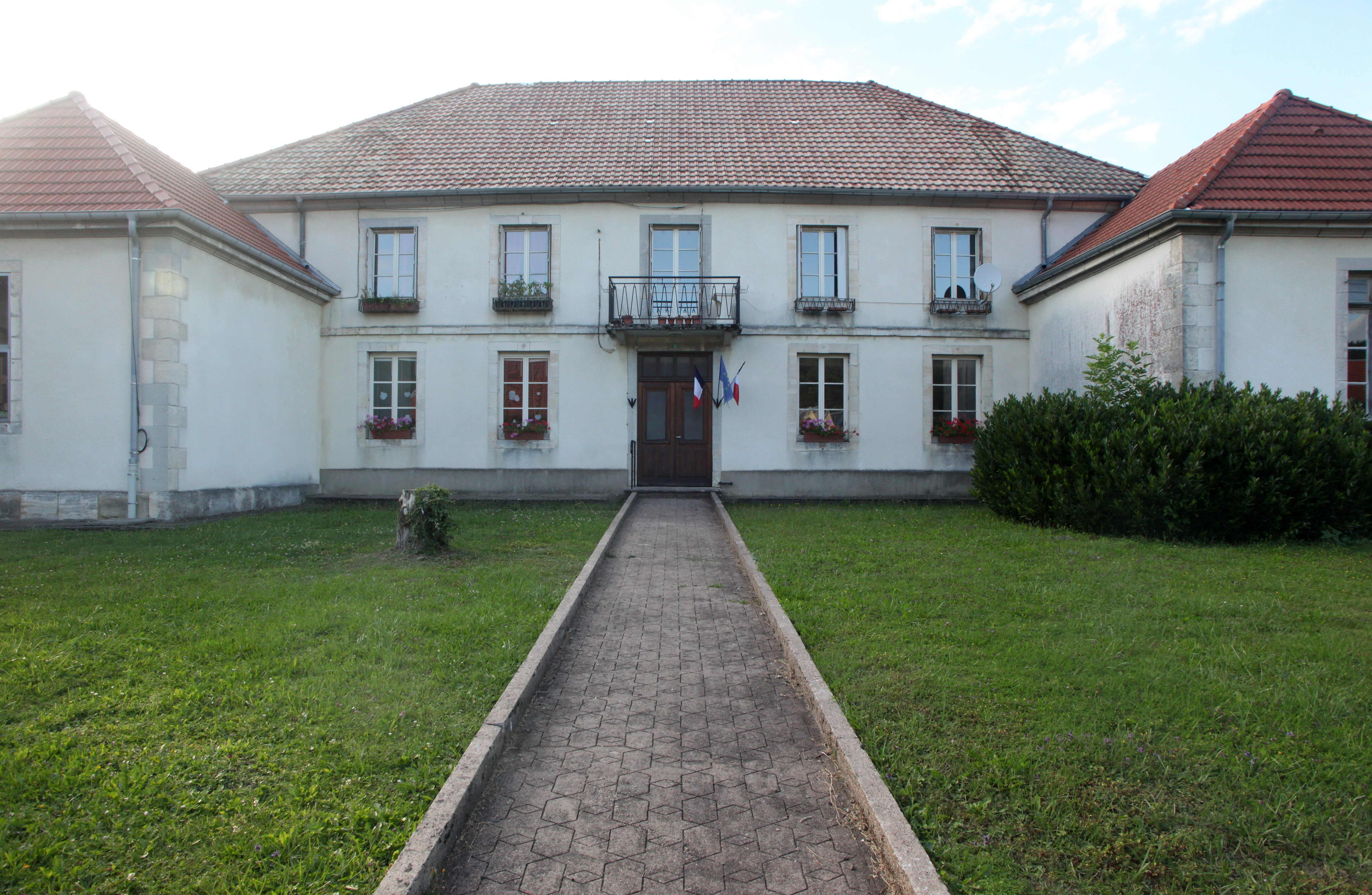 Mairie de Reugney (Doubs).